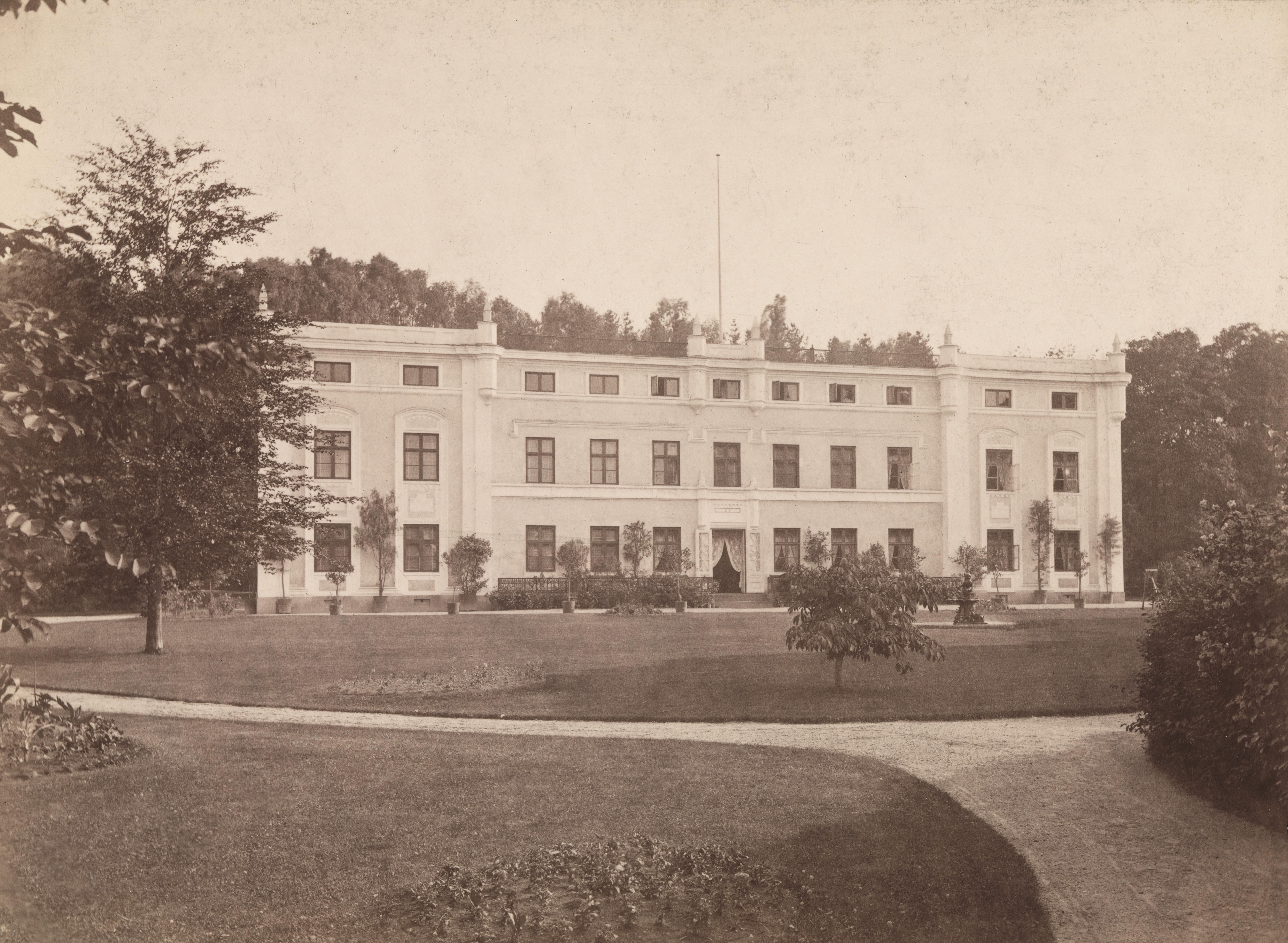 Sted: Ulefoss Kommune: Nome Fylke: Telemark Tagger: eksteriør fasader arkitekturfotografi